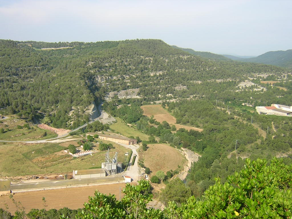 El Calders (Calders i Monistrol de Calders, Moianès)